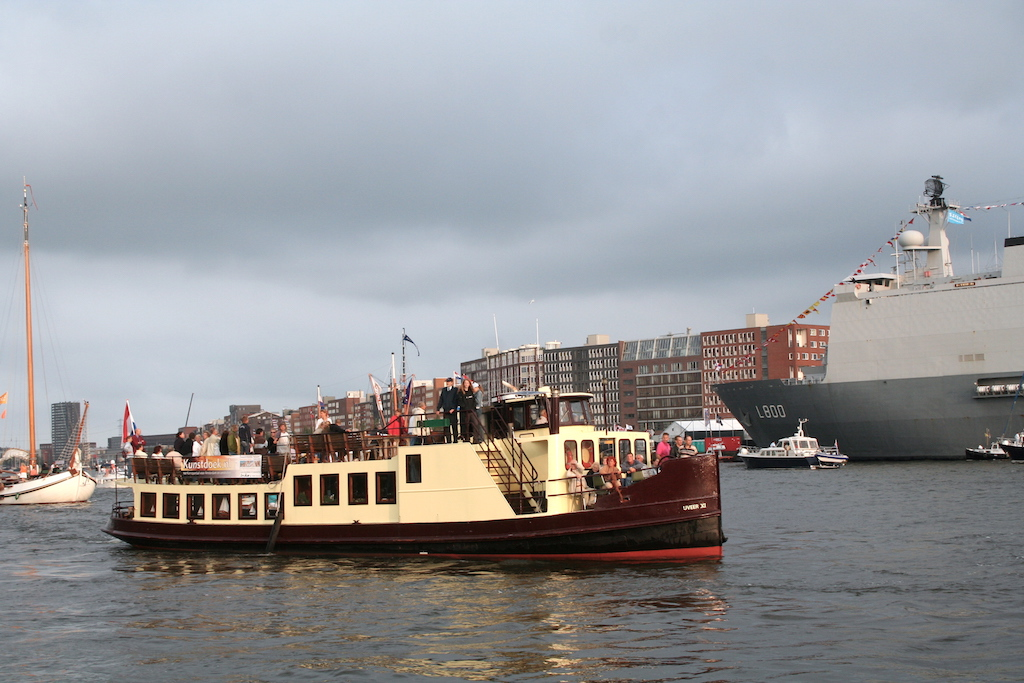 IJveer XI op een rondvaart tijdens Sail 2005. Foto: Erik Swierstra.